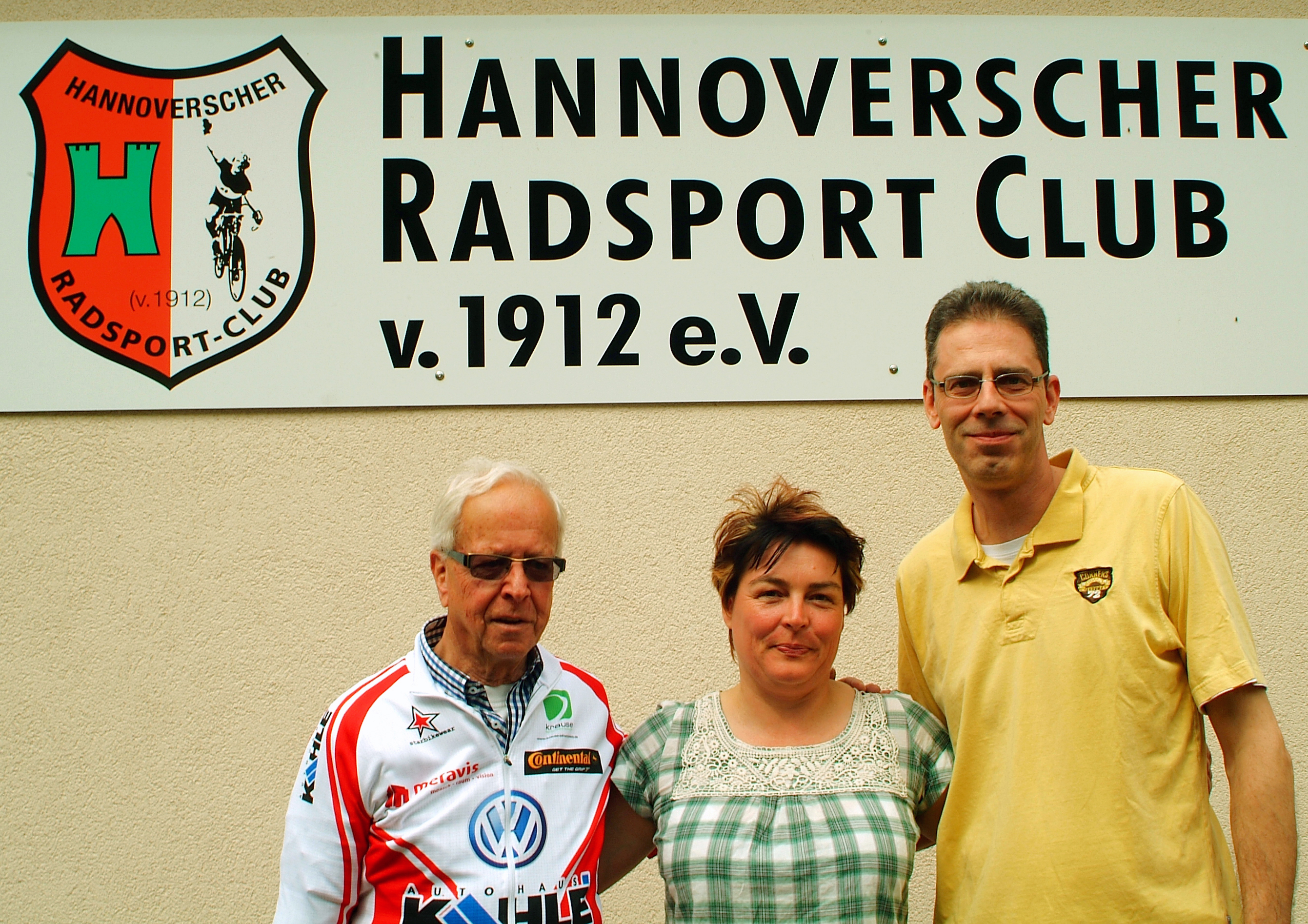 Gruppenbild im Jahr der 100-Jahr-Feier des Hannoverschen Radsport Clubs von 1912 e.V., vor dem Vereinshaus am Weddigenufer 23, von links: Reinhard Kramer, Ehrenvorsitzender; Cora Kielhorn, Vorsitzende; Thomas Munz, stellvertretender Vorsitzender.